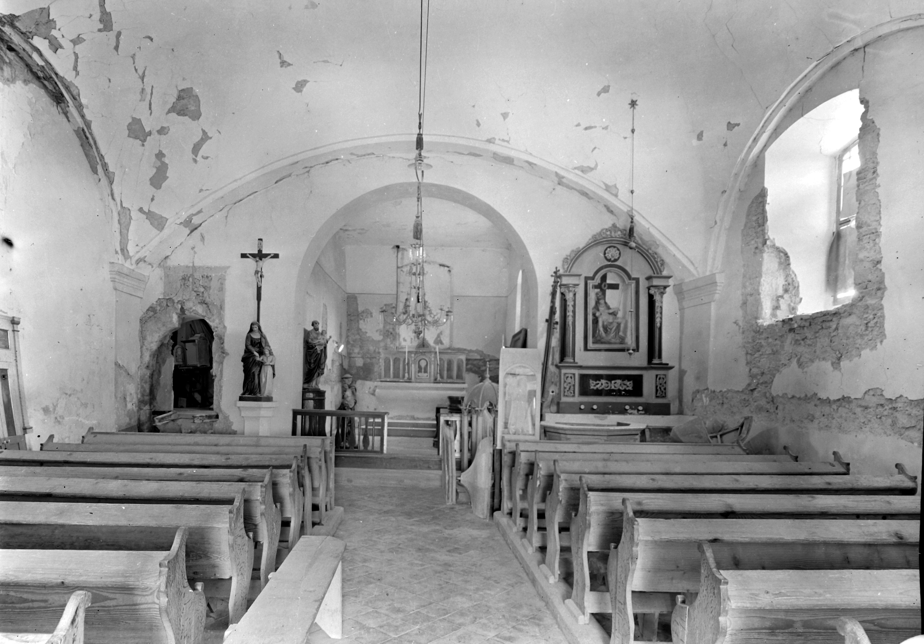 (Homokterenye), Szent Márton római katolikus templom. Location: Hungary Tags: church interior Title: (Homokterenye), Szent Márton római katolikus templom.